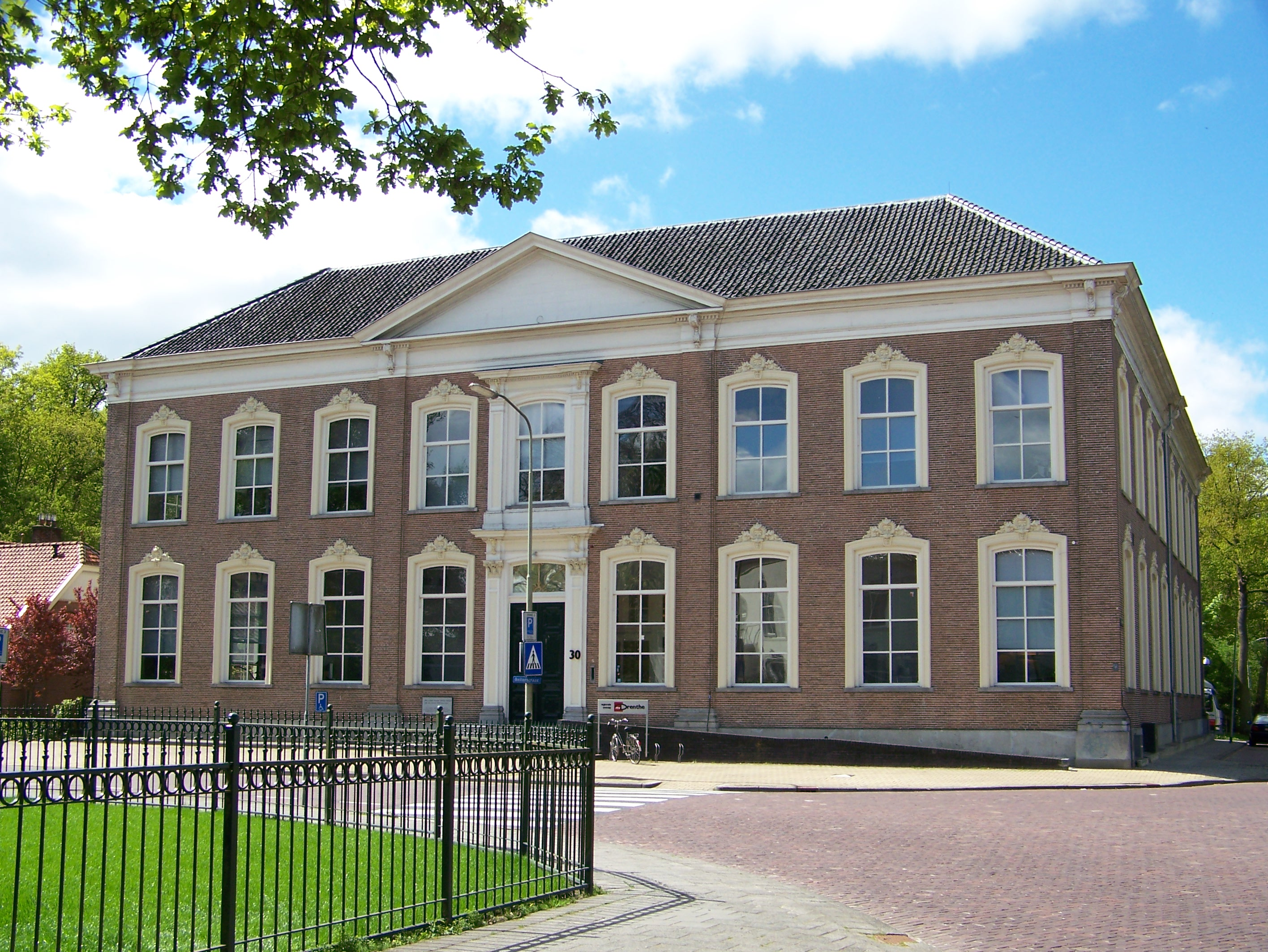 Rijks-HBS aan de Beilerstraat 30 in Assen, is een Rijksmonument.